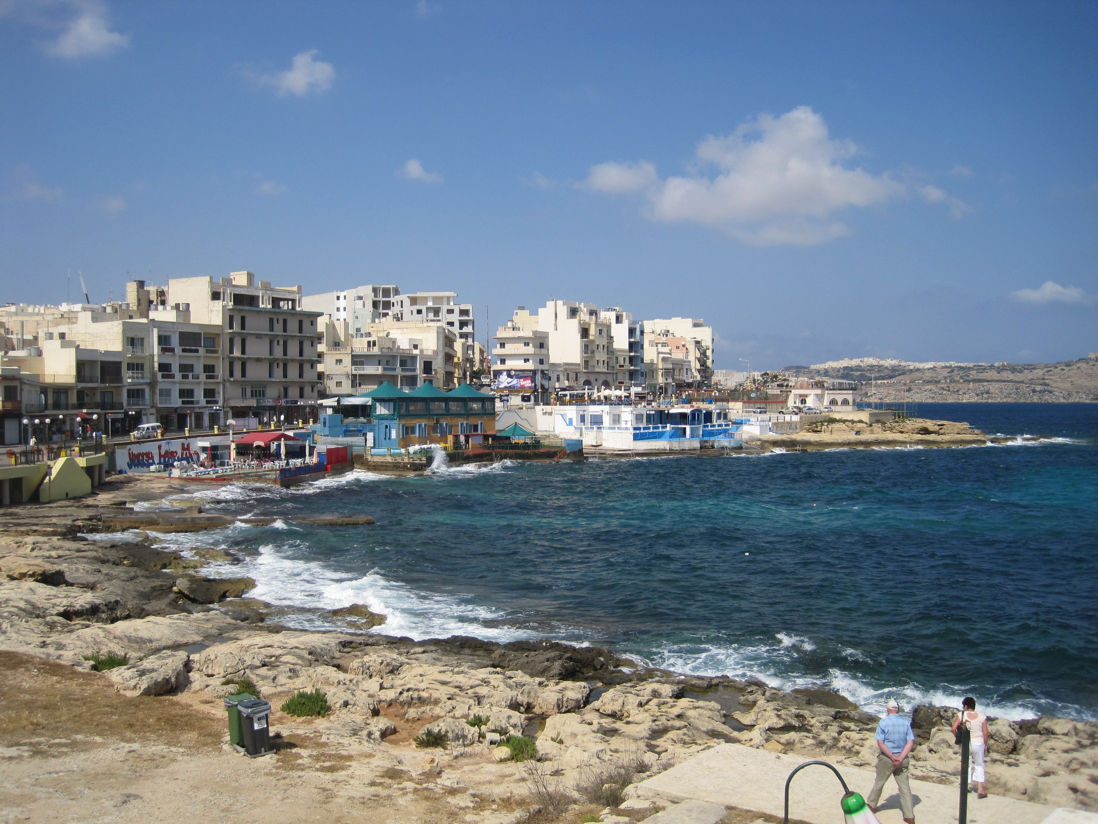 Bugibba - Malta